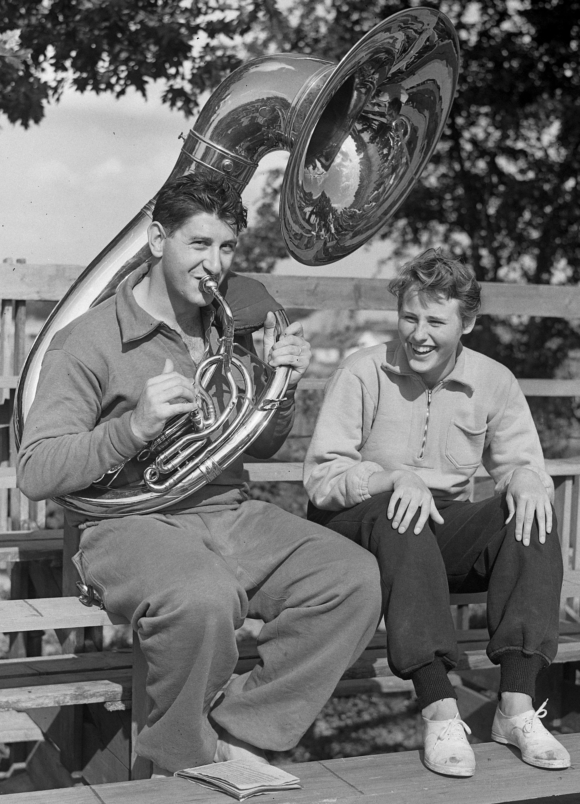 Zwemmen Nederland-Frankrijk. Tilburg. Alex Jony en Geertje Wielema.